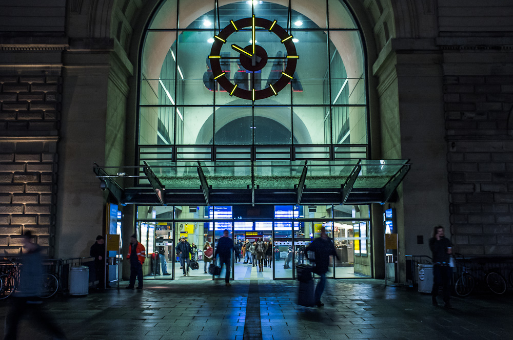 Eingangsbereich des Mannheimer Hauptbahnhofs bei Nacht